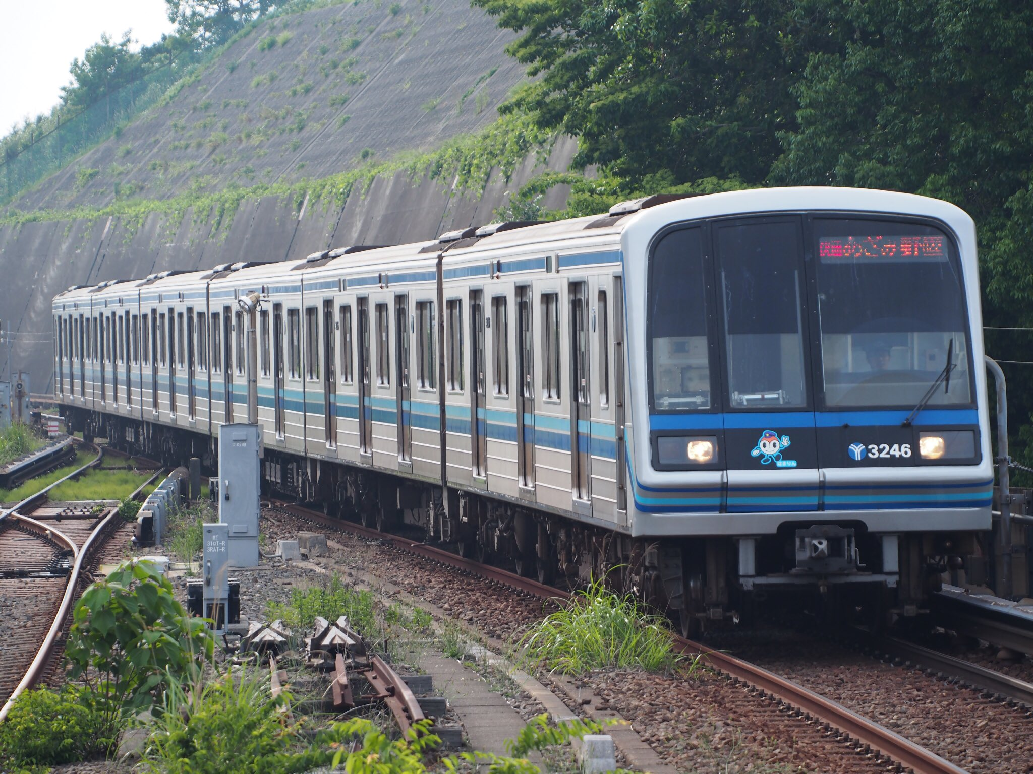 横浜市営地下鉄ブルーライン上永谷駅